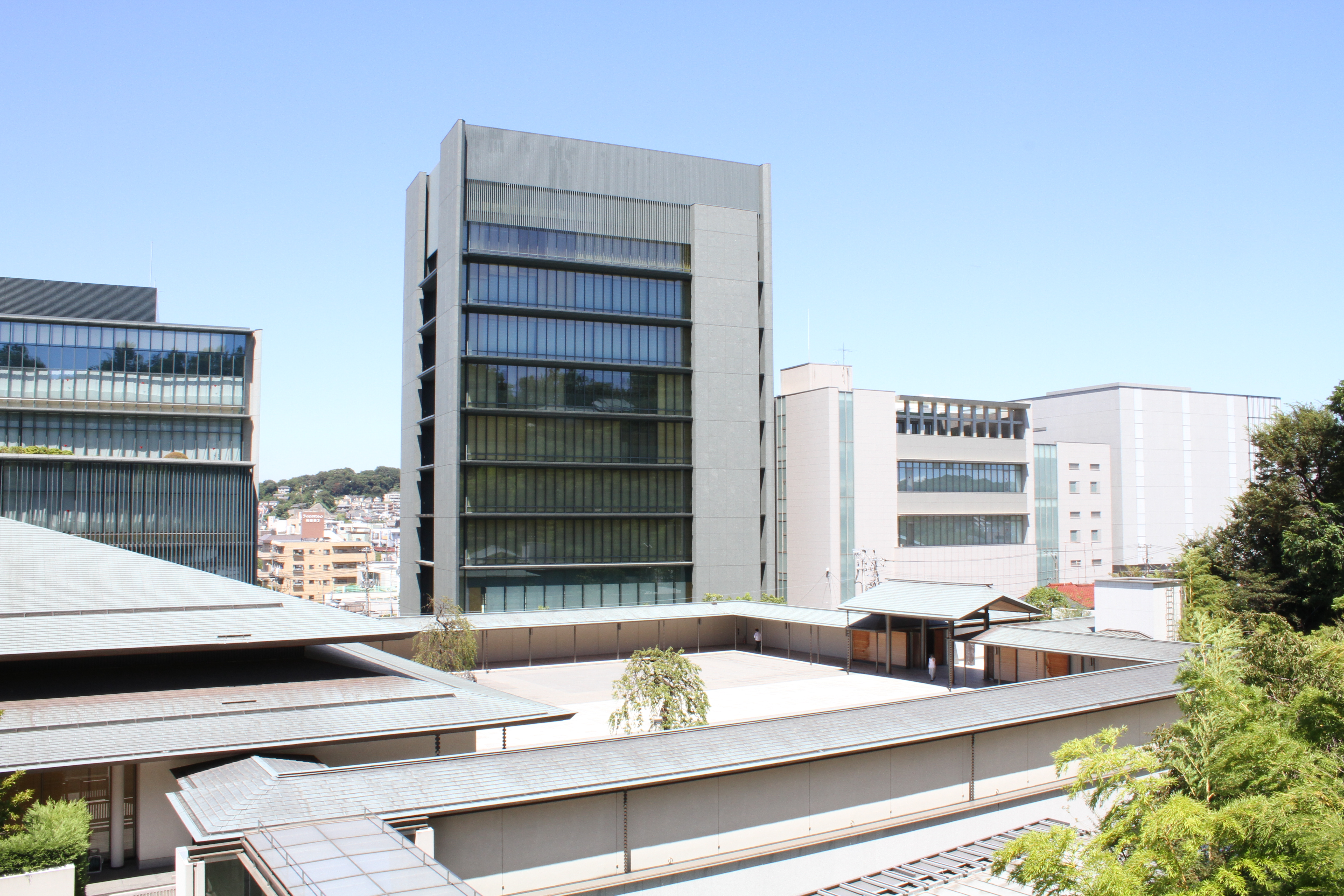 大山ねずの命神示教会